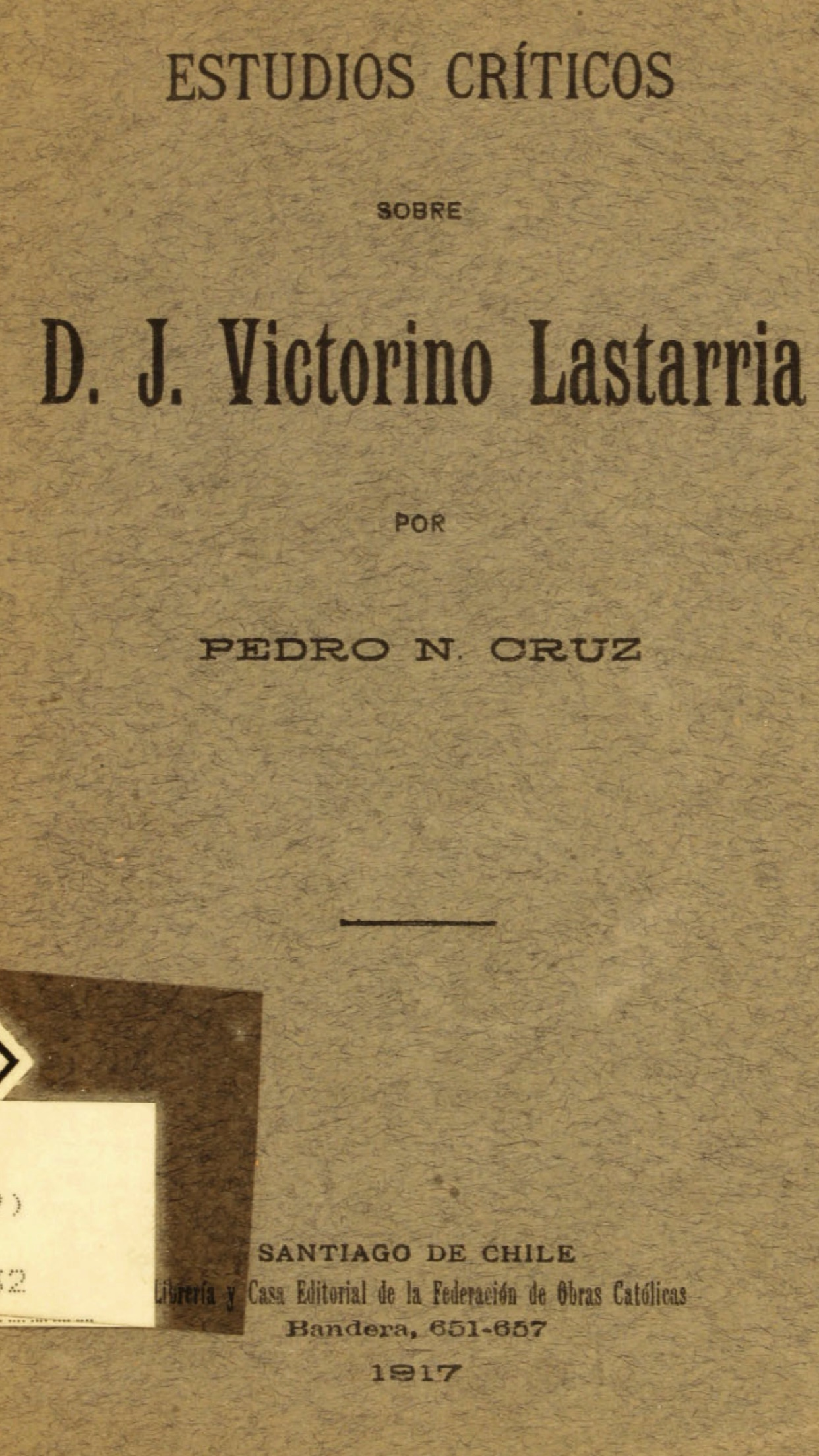 Portada del Libro Estudios Críticos sobre don José Victorino Lastarria del año 1917. Autor Pedro Nolasco Cruz Vergara